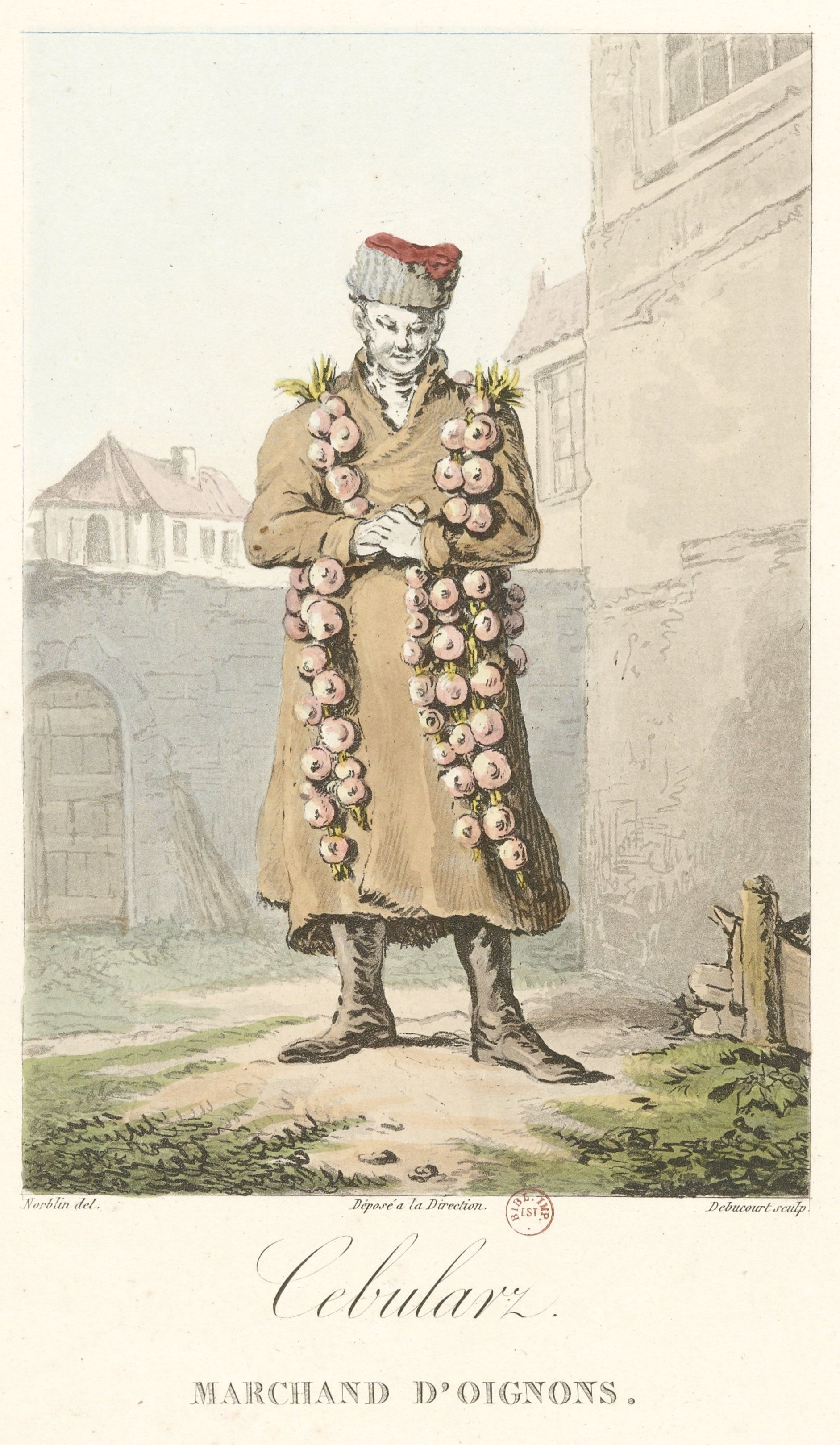 Торговец луком.